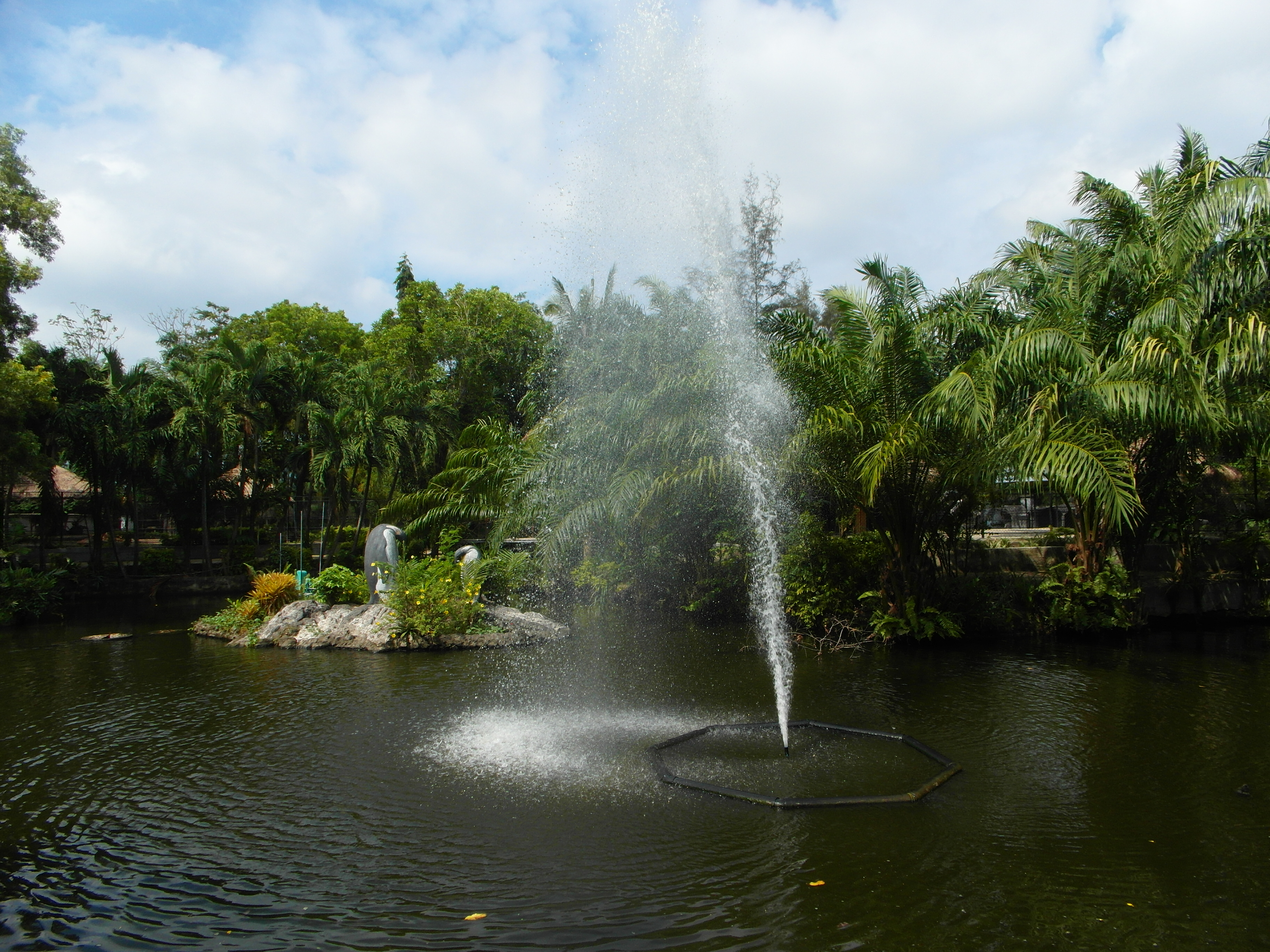 Phuket Zoo (2013 Dec.)